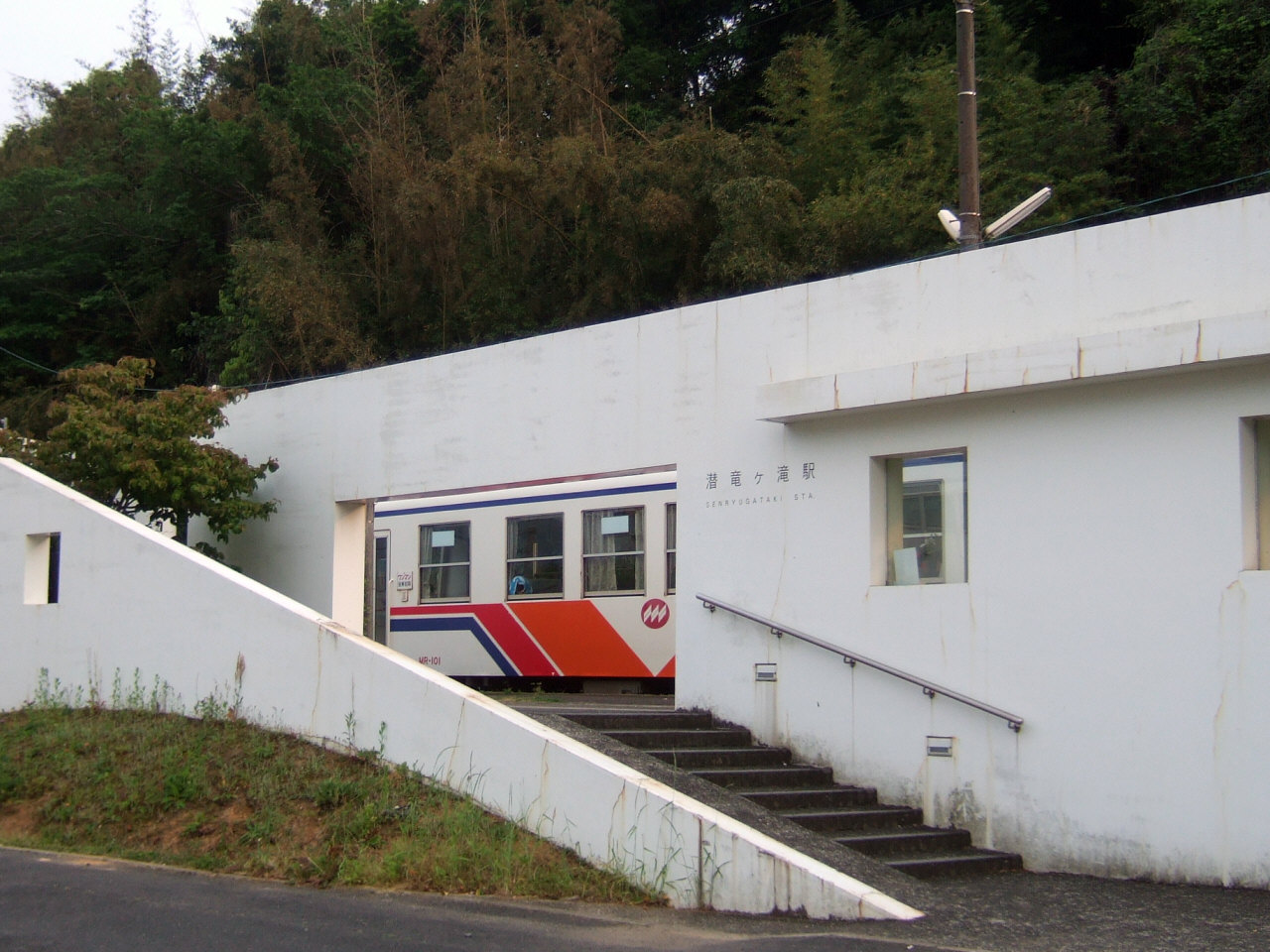 松浦鉄道潜竜ヶ滝駅（Matsuura Railway Senryugataki Station）